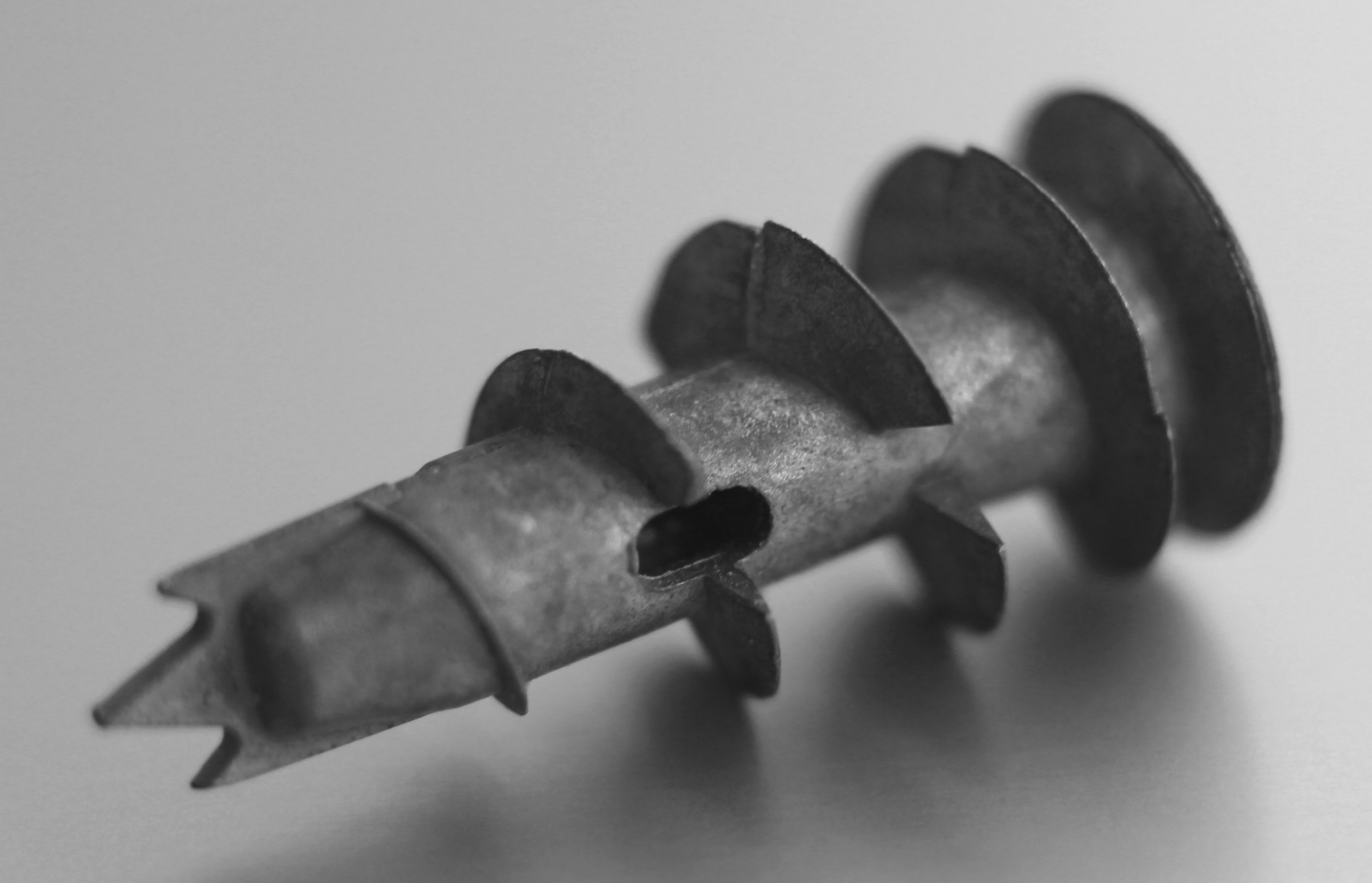 Bildinhalt: Ein Gipskartondübel, auch Rigipsdübel genannt, in schwarz-weiß Aufnahmeort: Frankfurt am Main, Deutschland